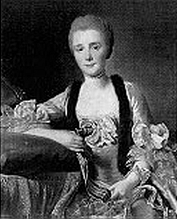 Margaretha Heitz, seit 1752 verheiratet mit dem Basler Seidenbandfabrikanten Martin Bachofen (1727-1814), dem Bauherren von Schloss Ebenrain.